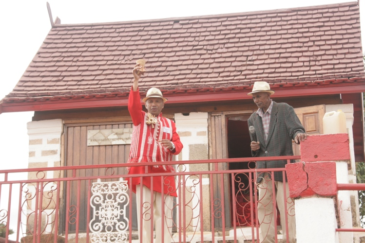 Alamady